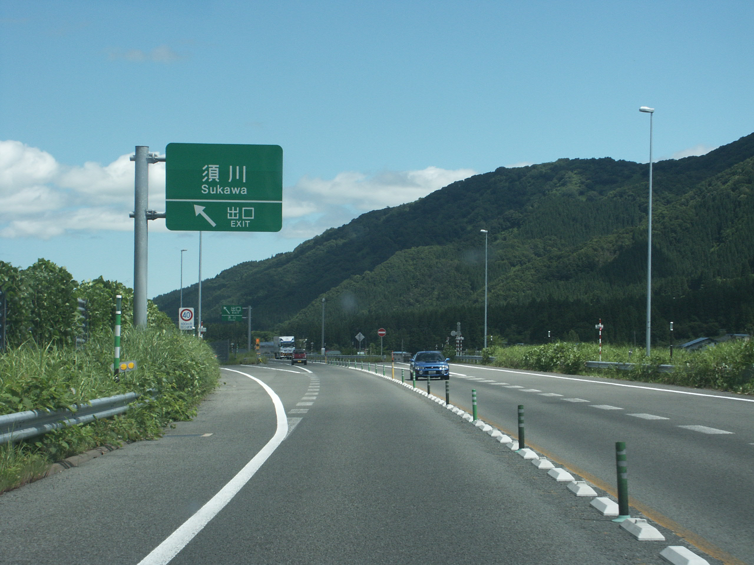 東北中央自動車道（湯沢横手道路）須川IC出口（雄勝こまちIC方面側）